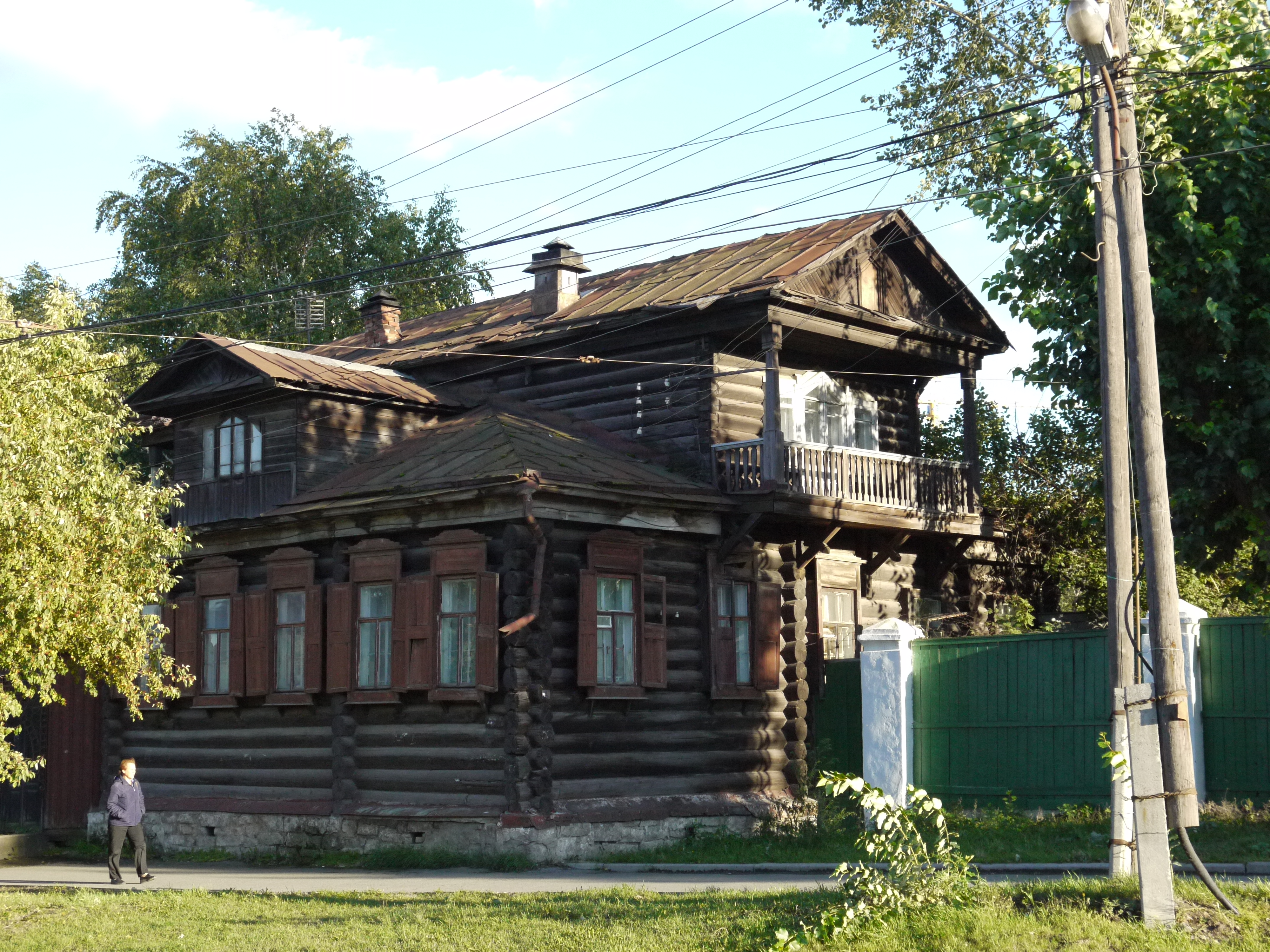 Памятник архитектуры: дом М. М. Сарафанова, г. Екатеринбург, ул. Кирова, 63.